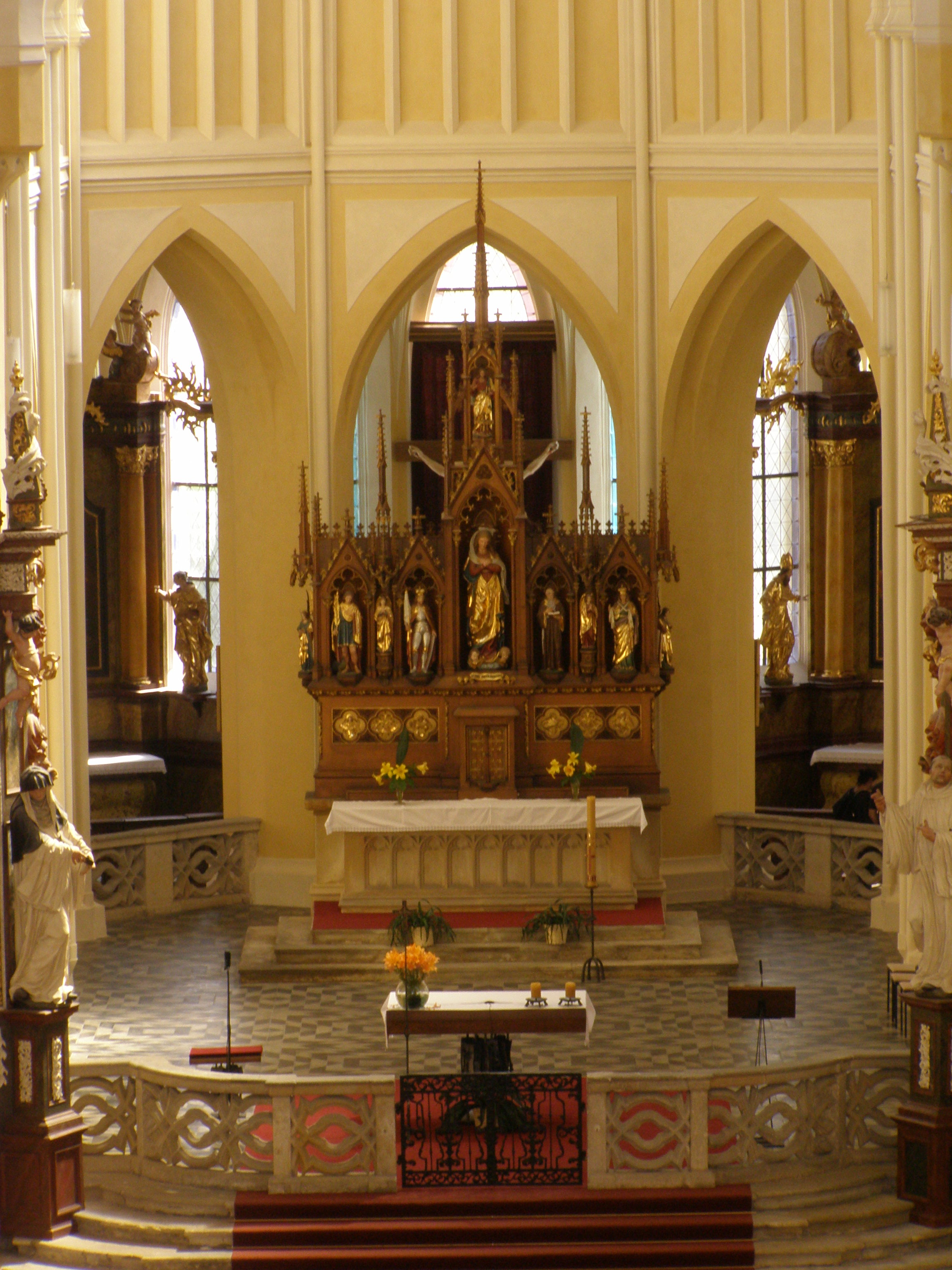 Kutná Hora, část Sedlec, klášterní kostel Nanebevzetí Panny Marie a svatého Jana Křtitele, presbytář